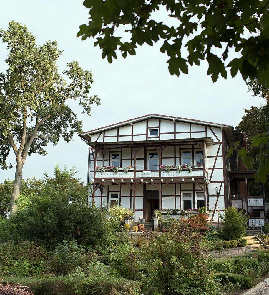 Villa Vinberg in Hitzacker